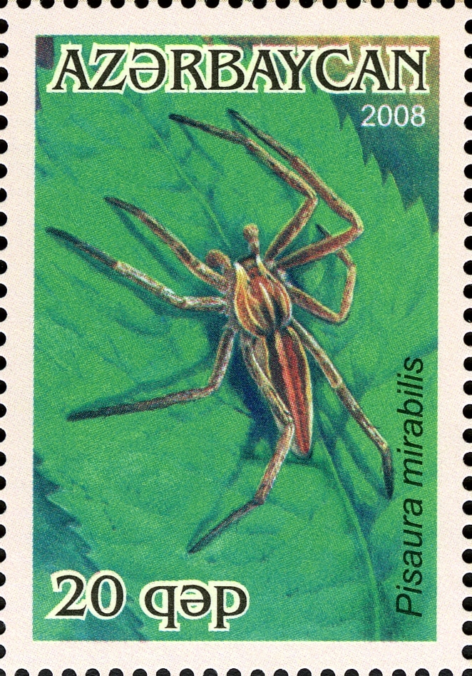 Hörümçəkkimilər.